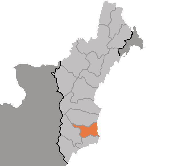 Map of Myongchon, Hamgyong-pukto, DPRK, 2006